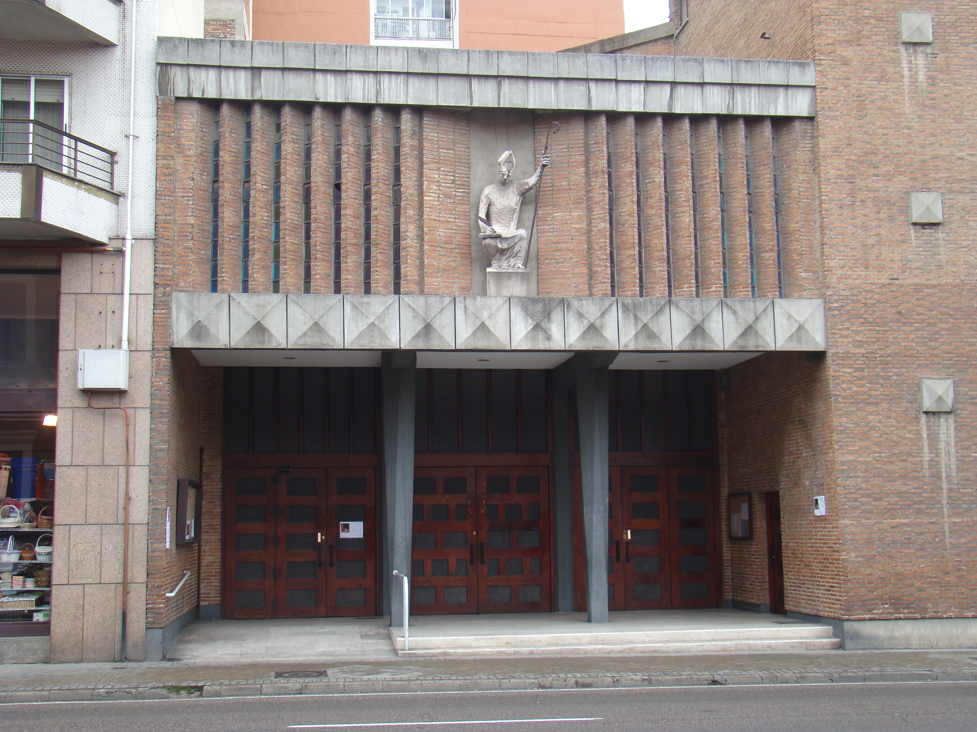 Iglesia parroquia de San Ildefonso en la ciudad de Valladolid (España). Es una construcción del siglo XX sobre el solar de la antigua iglesia cuya portada se conserva en el interior a modo de retablo.